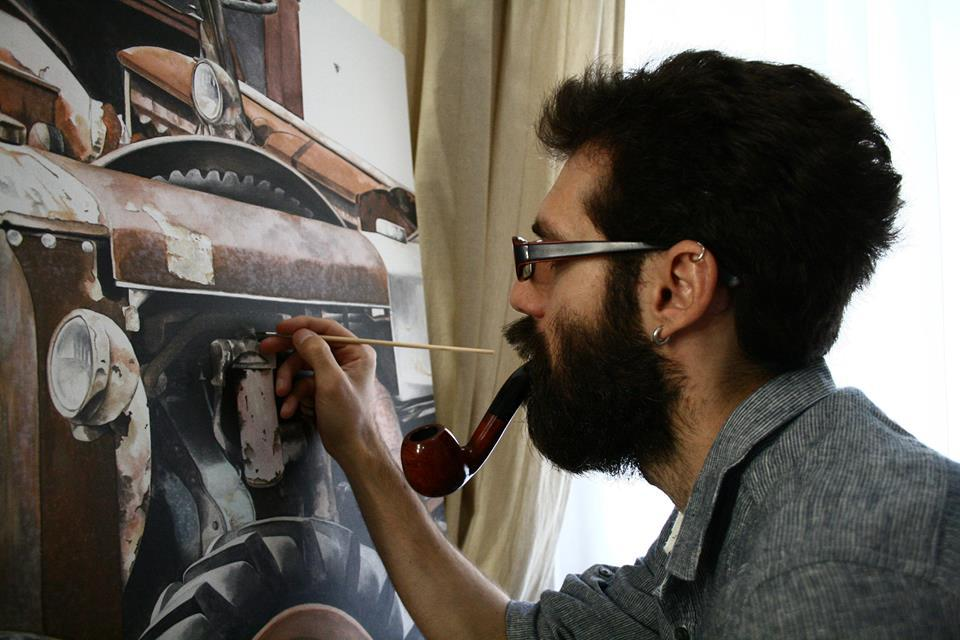 Ritratto del pittore